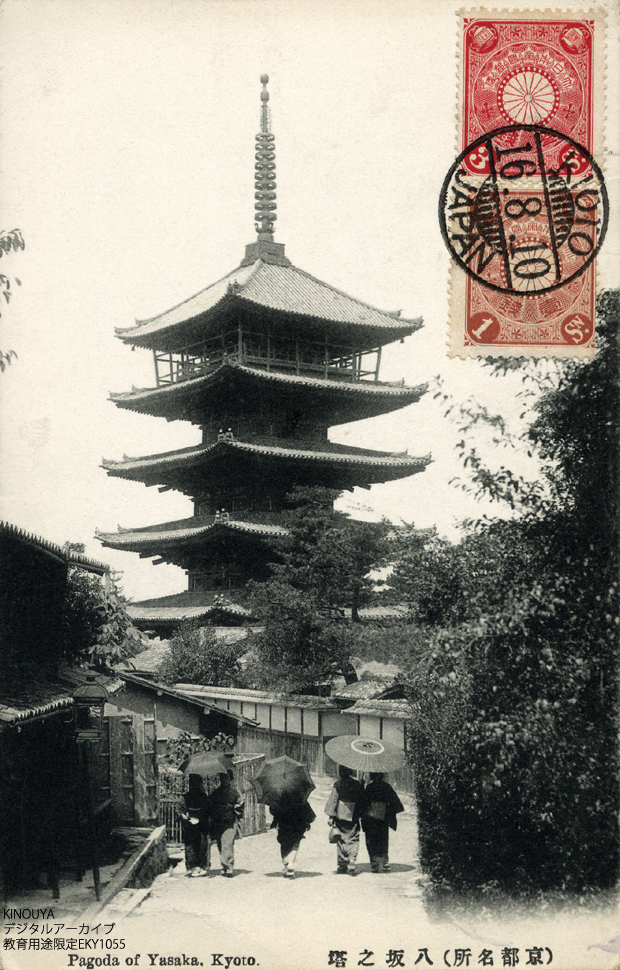 Pagoda of Yasaka, Kyoto